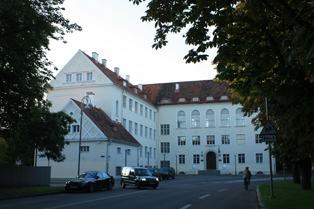 Ristiku Primary School (Ristiku Põhikool) in Pelgulinn, Tallinn.